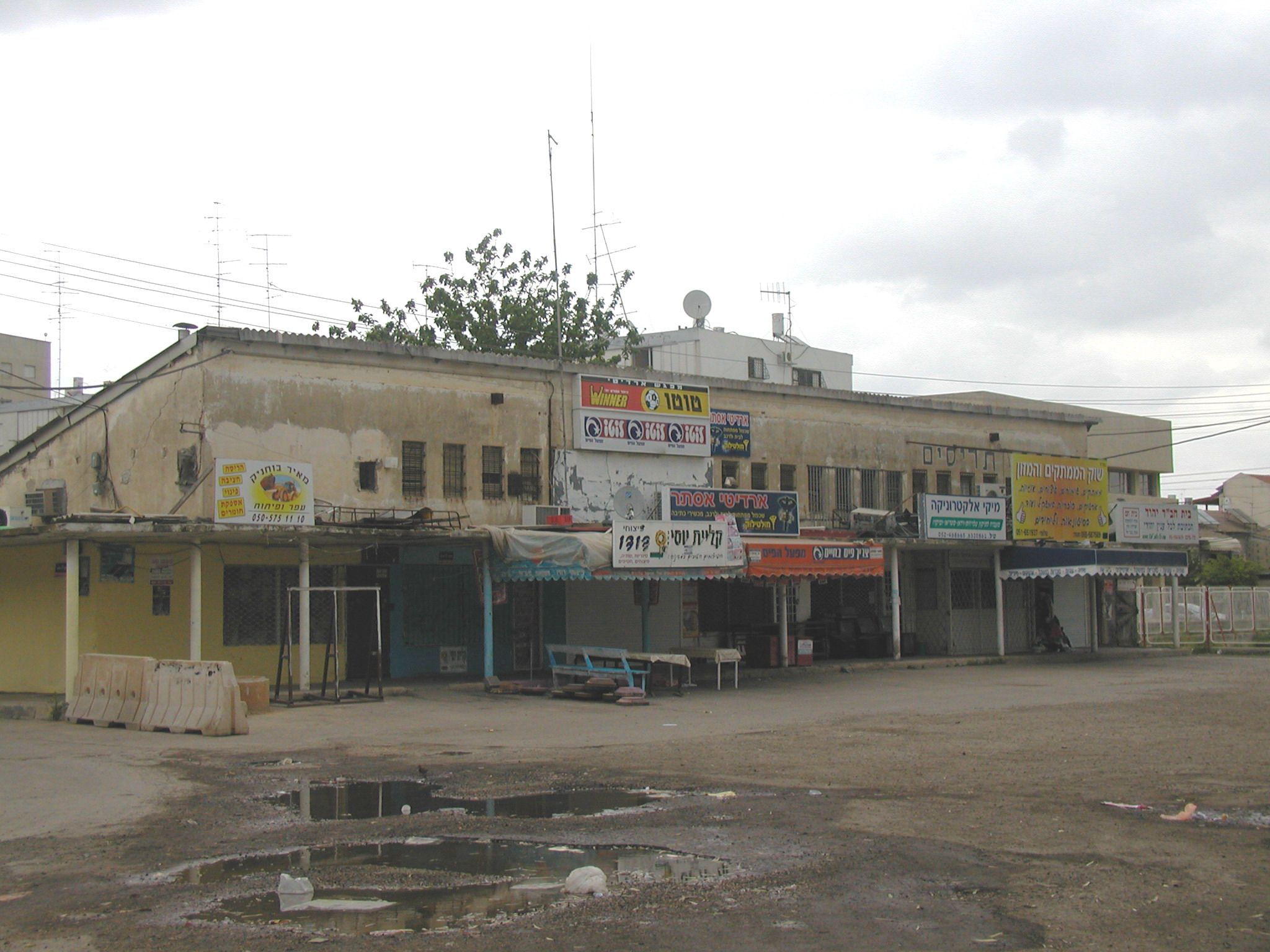 שוק אשכנזי (השוק הישן) ביהוד